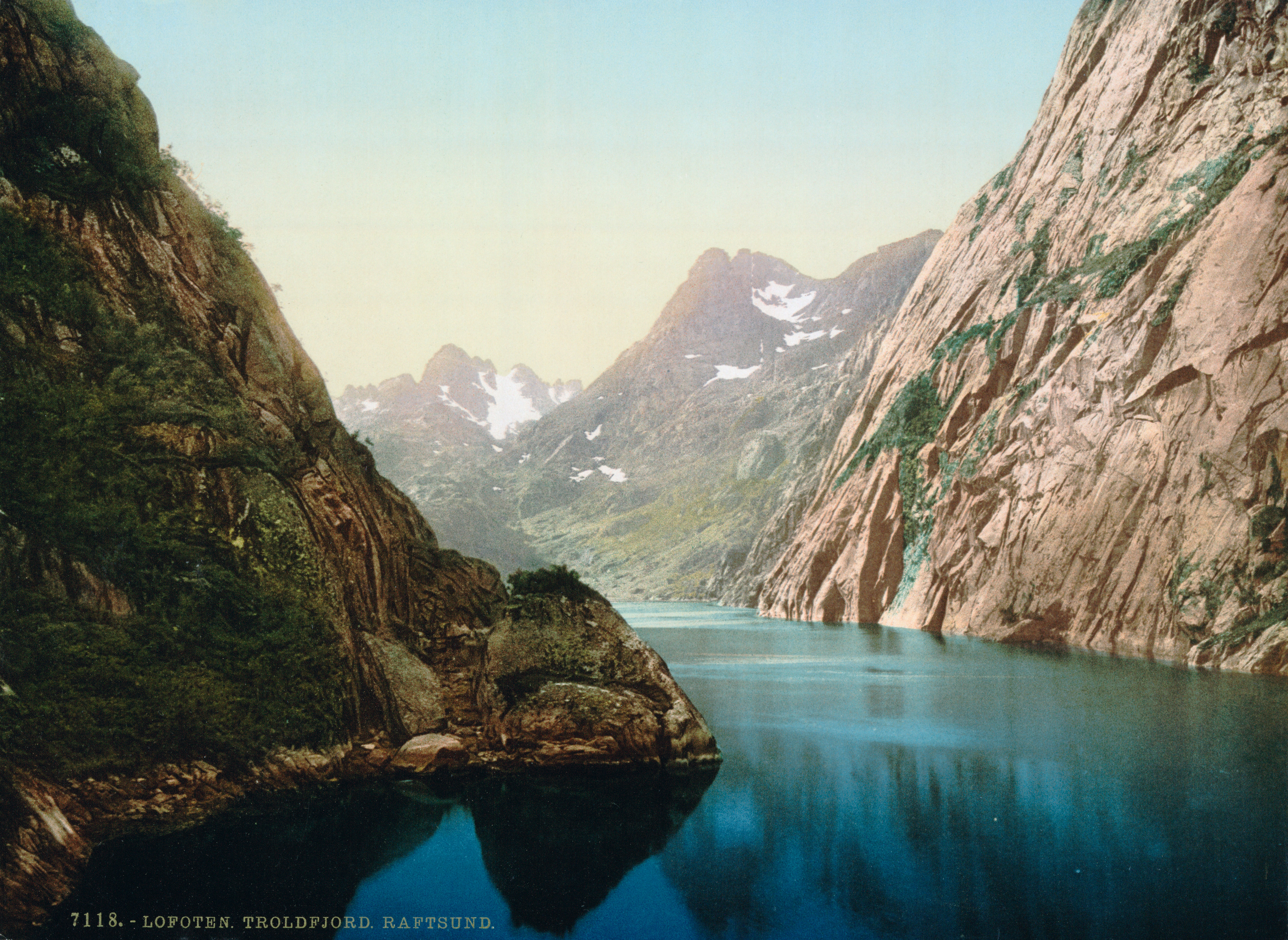 Troldfjord, Raftsund, Lofoten in Norway